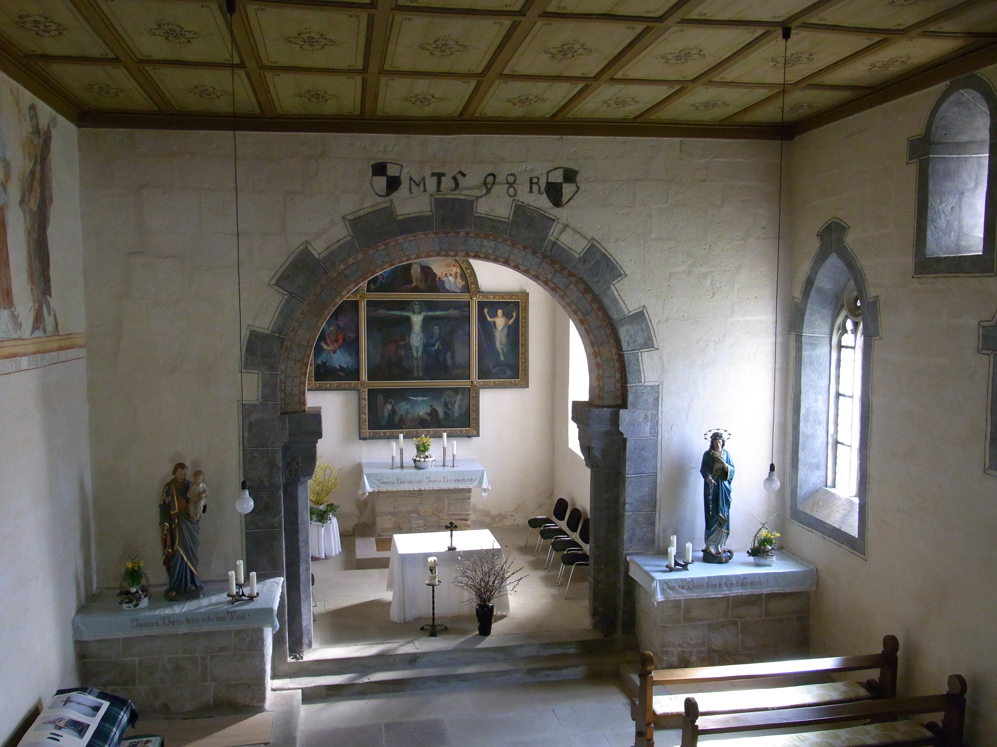 Owingen: Weilerkirche